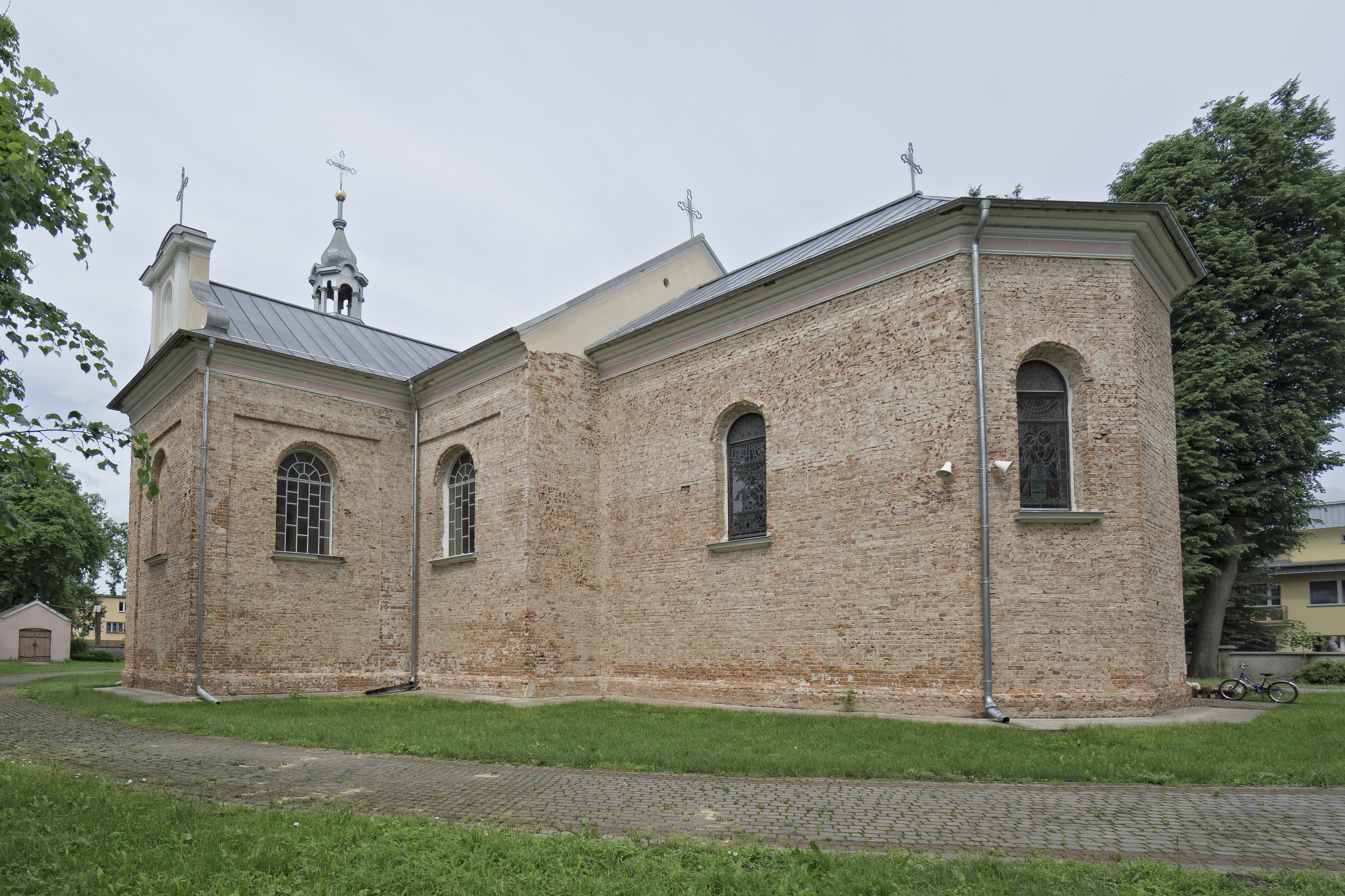 Kościół Nawiedzenia Najświętszej Maryi Panny w Michowie. W trakcie renowacji elewacji.